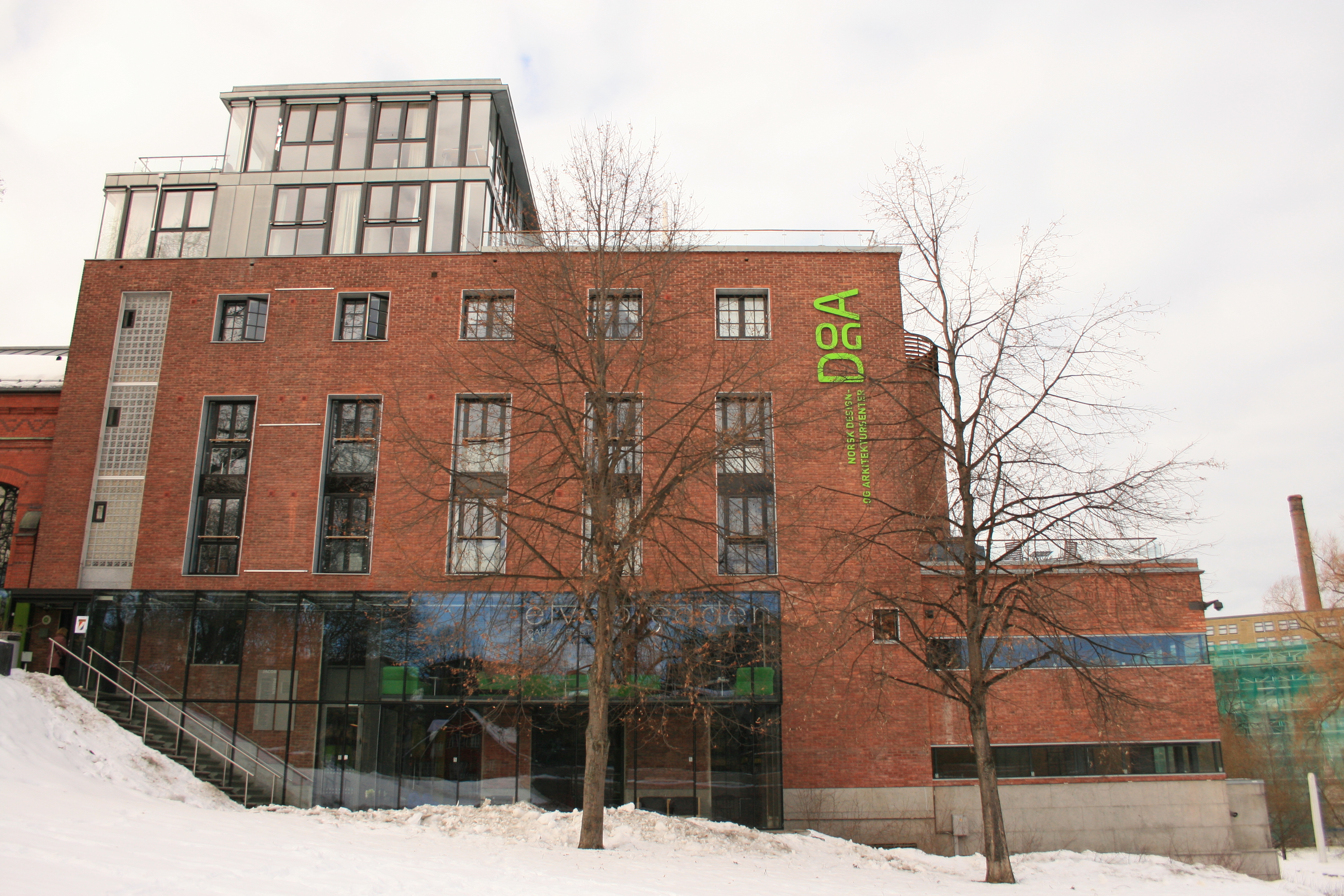 DogA Norsk Design- og Arkitektursenter Hausmanns gate 16 i Oslo.